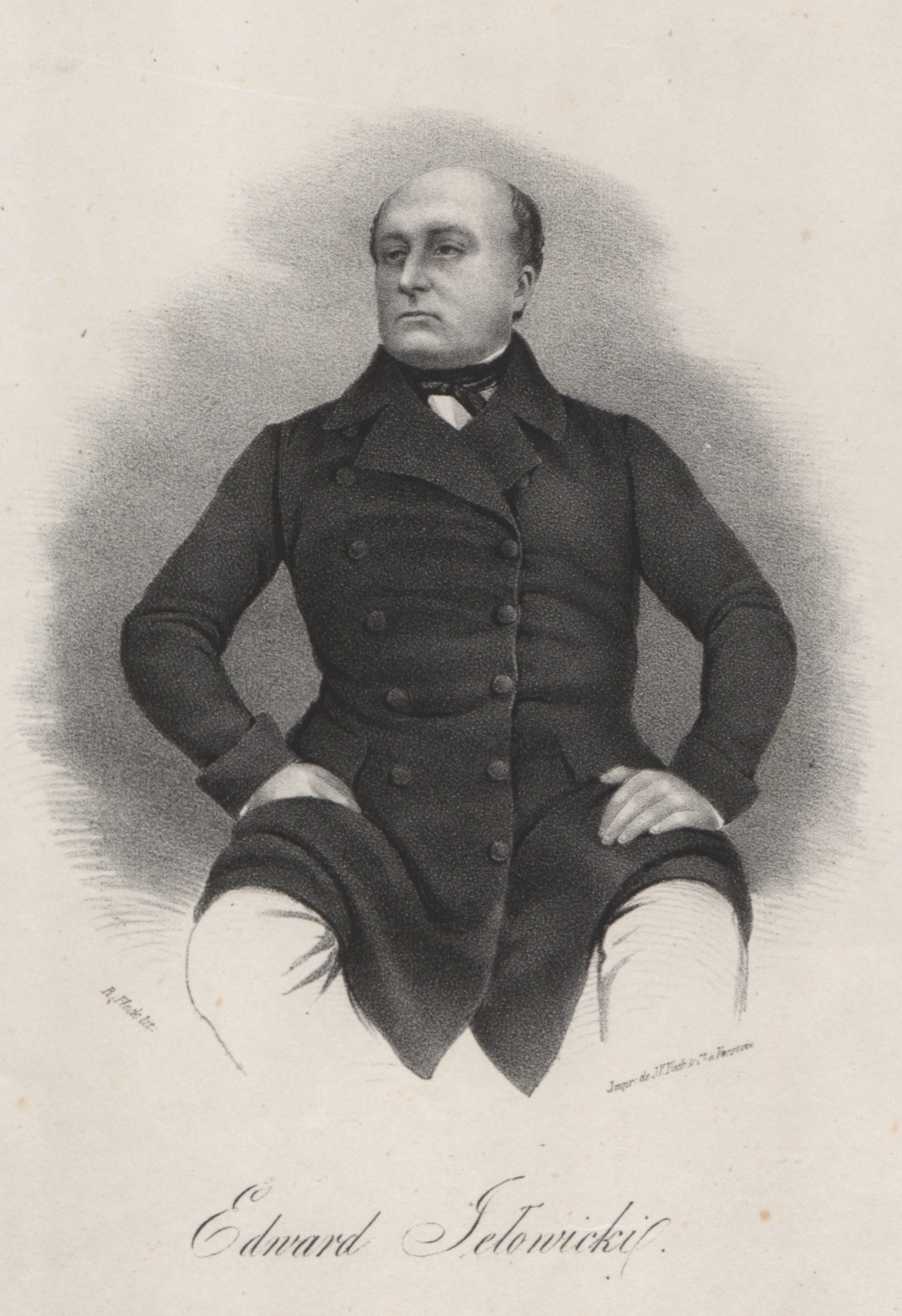 Edward Jełowicki